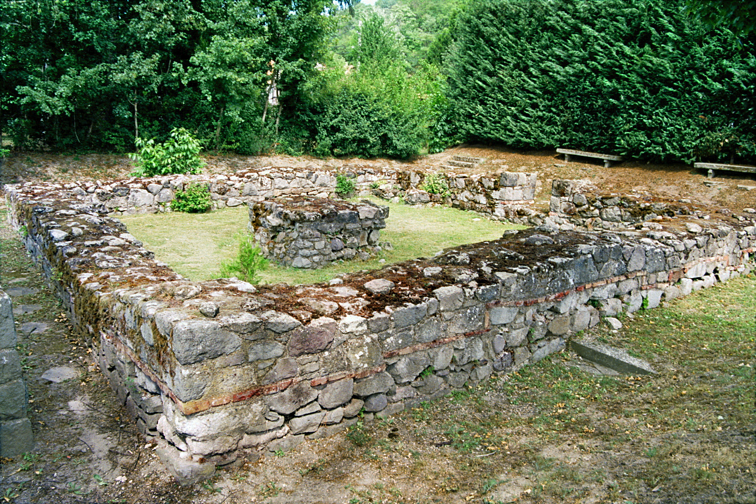 Visegrád-Steinbruch (Burgus Solva 24).